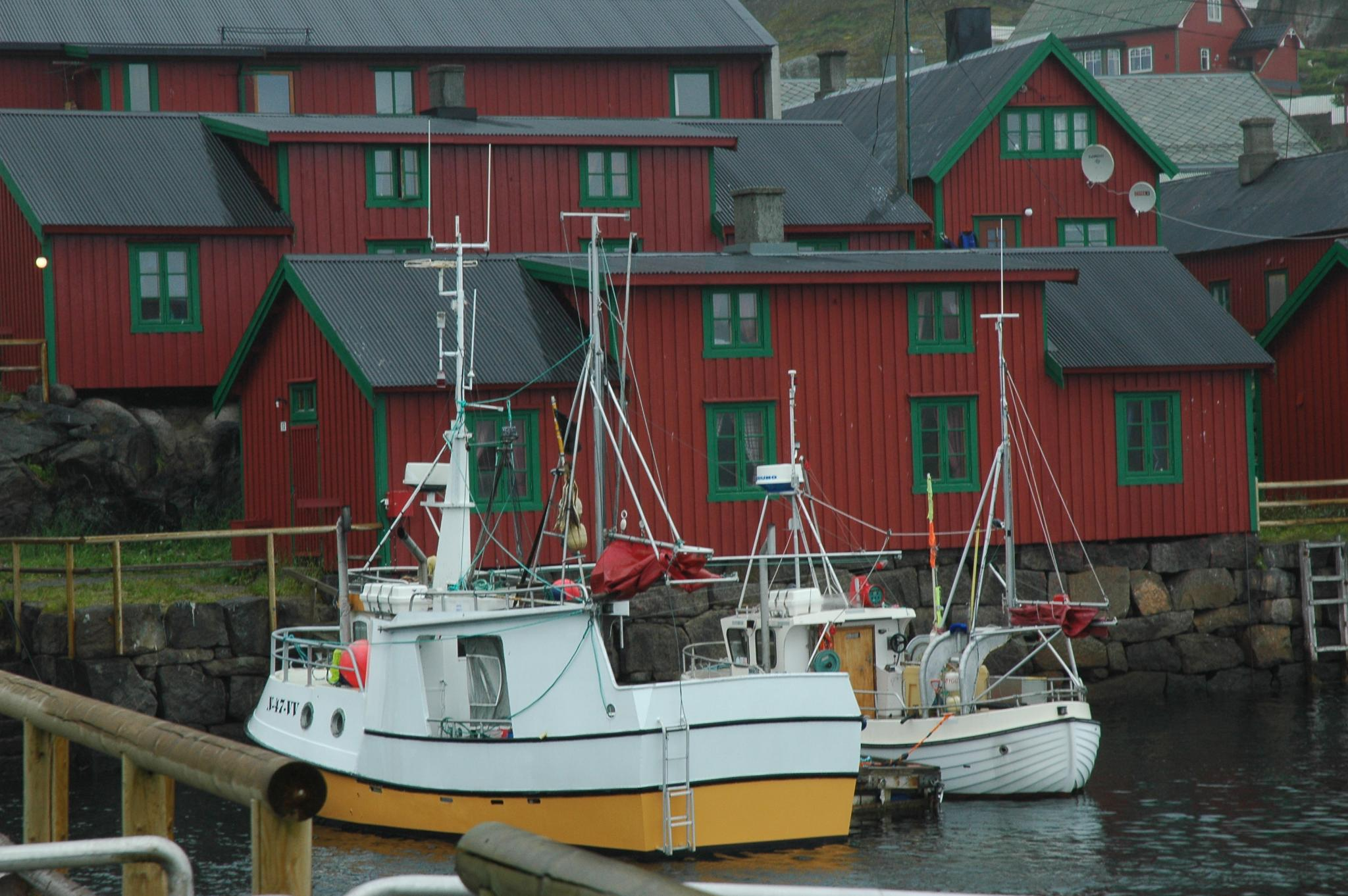 Stamsund Hafen